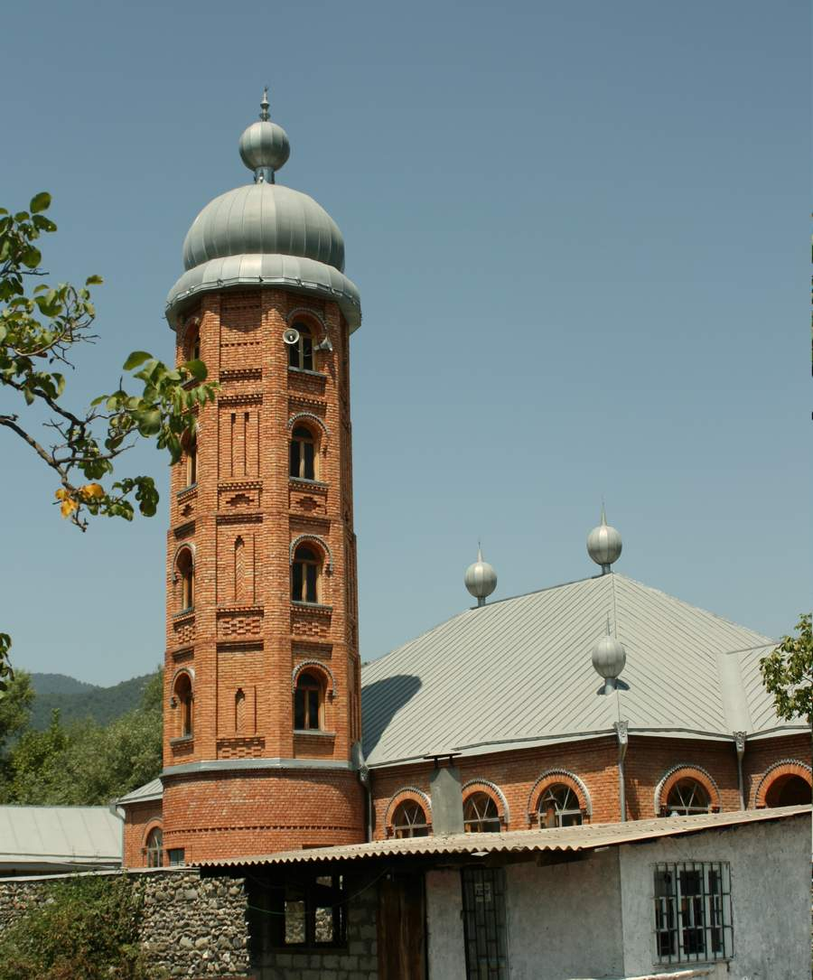 Ваххабитская мечеть. Ваххабитская мечеть в Дуиси. Построена вроде бы в годы первой Чеченской войны на средства самого Хаттаба